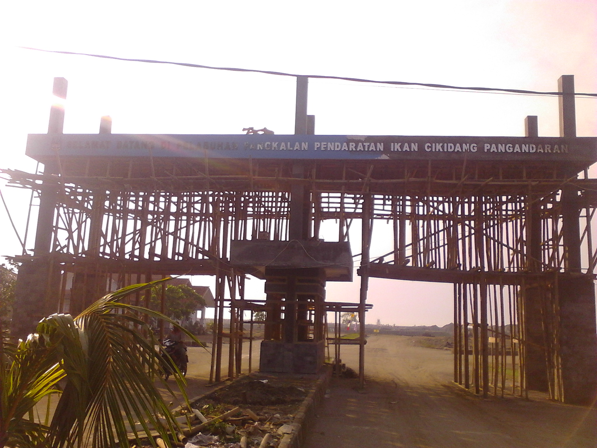 Pintu Masuk Pelabuhan Pendarata Ikan PPI Cikidang Babakan